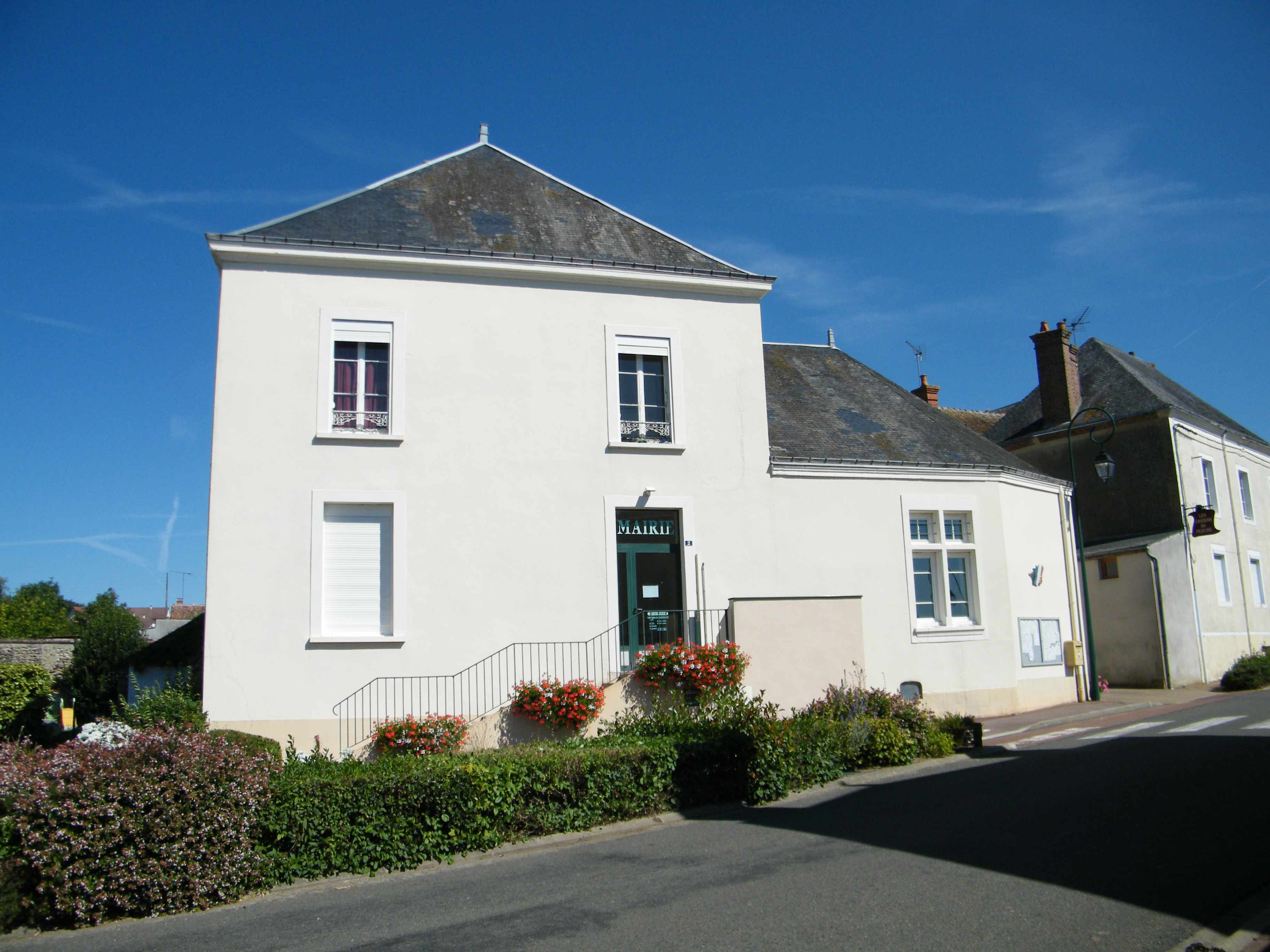 Melleray, Sarthe, Fr, mairie